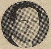 대한민국의 정치인